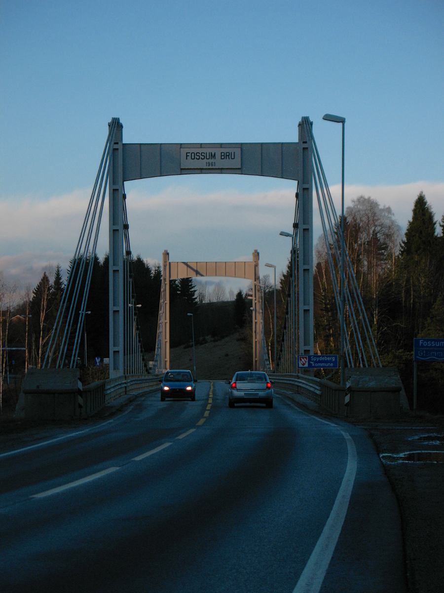 Fossum bro på Fylkesvei 128, tidligere en del av E18, som går mellom Knapstad i Hobøl og Momarken i Eidsberg. Veiens lengde er 8,1 km.